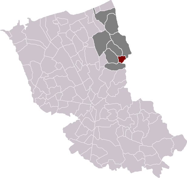 Locatie gemeente Oostkappel in arrondissement Duinkerke. Zelfgemaakt. Location of Oost-Cappel municipality in the arrondissement of Dunkirk. Self made. Localisation de la commune de Oost-Cappel dans l'arrondissement de Dunkerque. Fait moi-même.